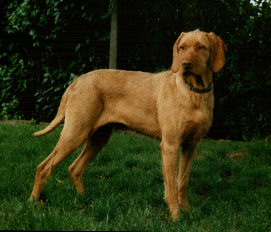 Magyar Vizsla Drahthaar Hündin; MVD gehört zur FCI Gruppe 7 Vorstehhunde mit Arbeitsprüfung